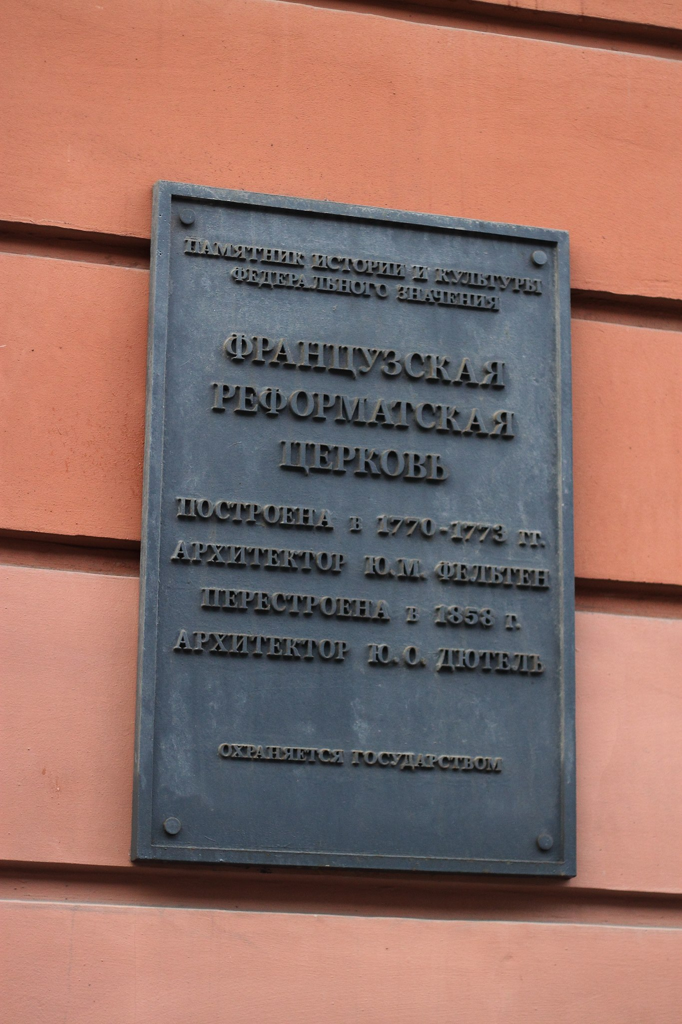 Французская реформаторская церковь в Санкт-Петербурге